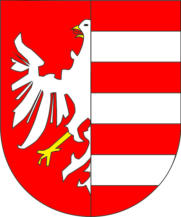 coats of arms of the bourgraviat of Magdenbourg